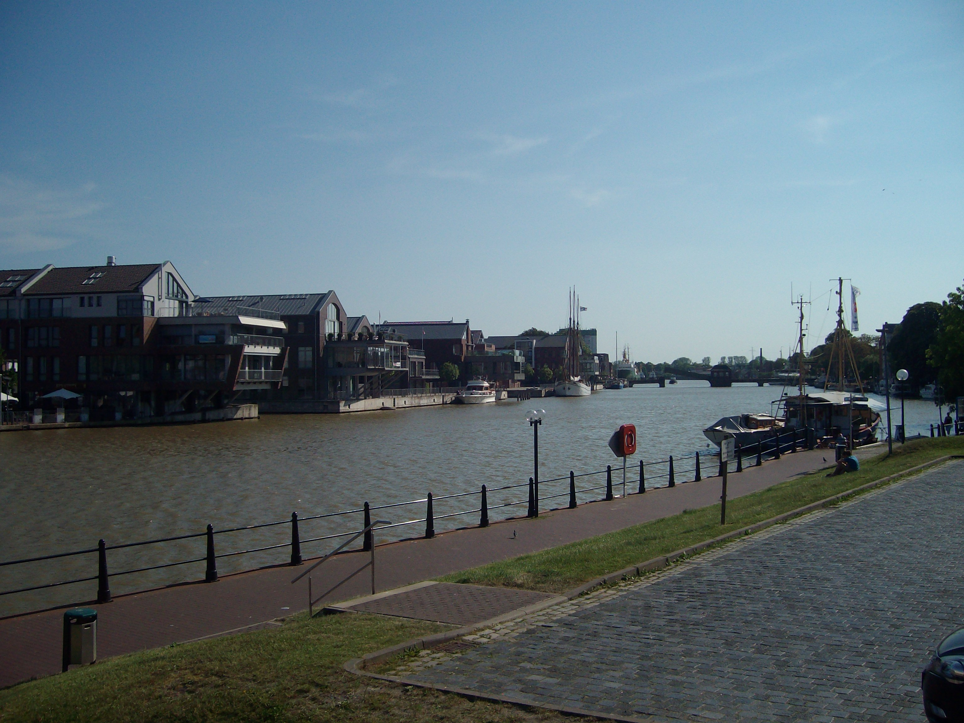 Hafen in Leer (Ostfriesland), Niedersachsen